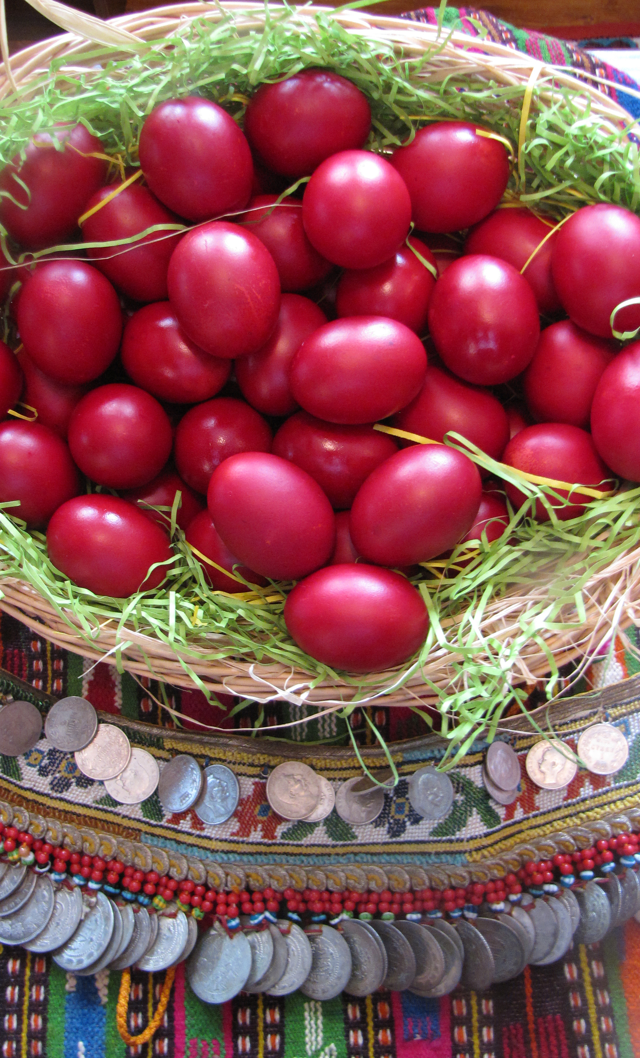 Традиционално вапцање црвени јајца за велигден, поставени на македонска народна ракотворба